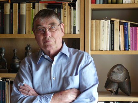 Porträt Uli Bohnen